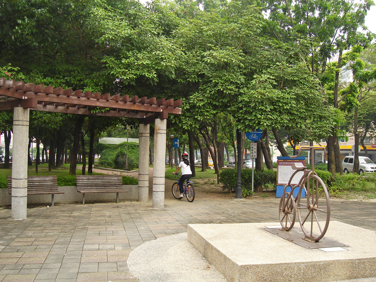 台中市忠明園道的自行車裝置藝術